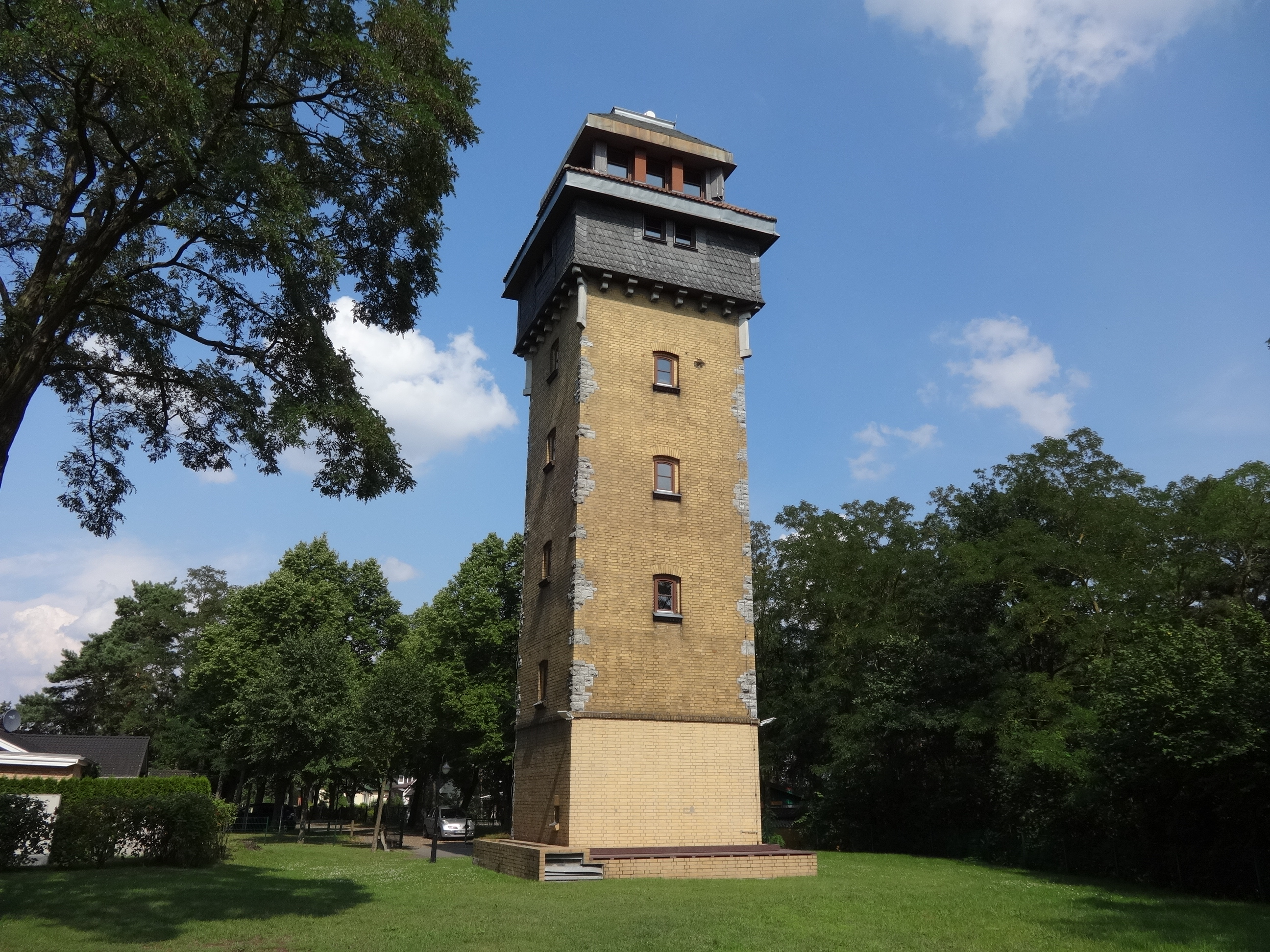 Wachtelturm in Hennickendorf, Ortsteil von Rüdersdorf bei Berlin, Brandenburg